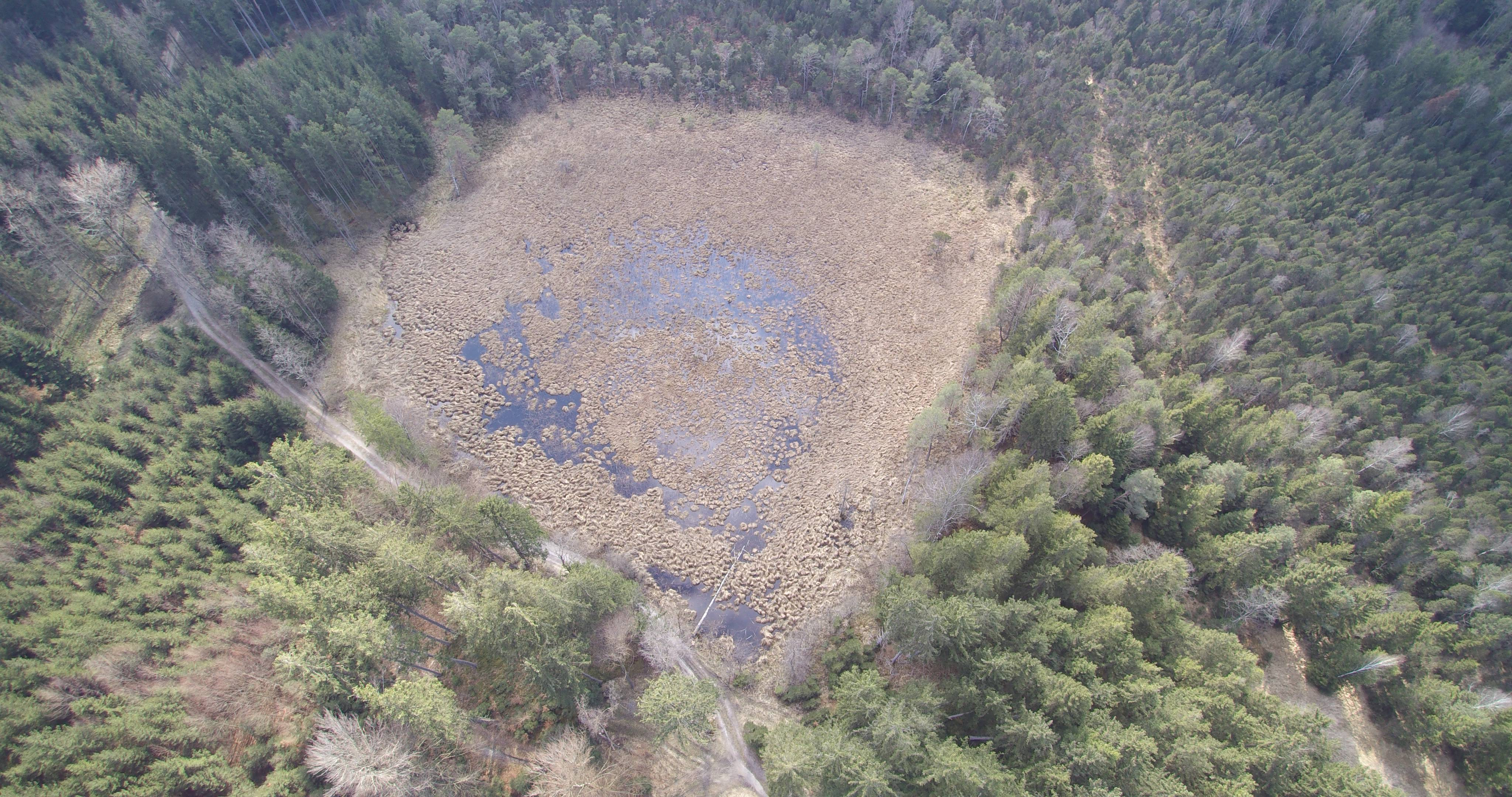 Luftbild Egelsee April 2017